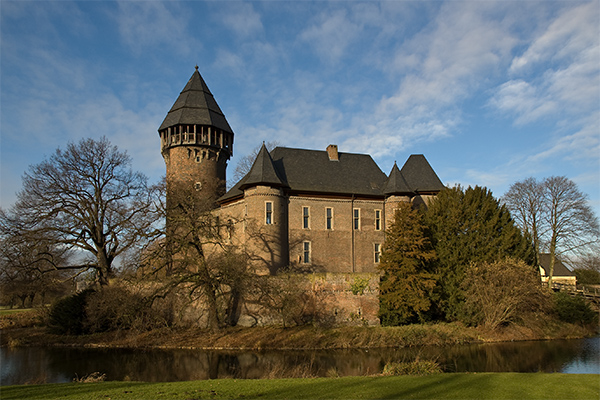 Burg Linn an einem klaren Tag im Winter